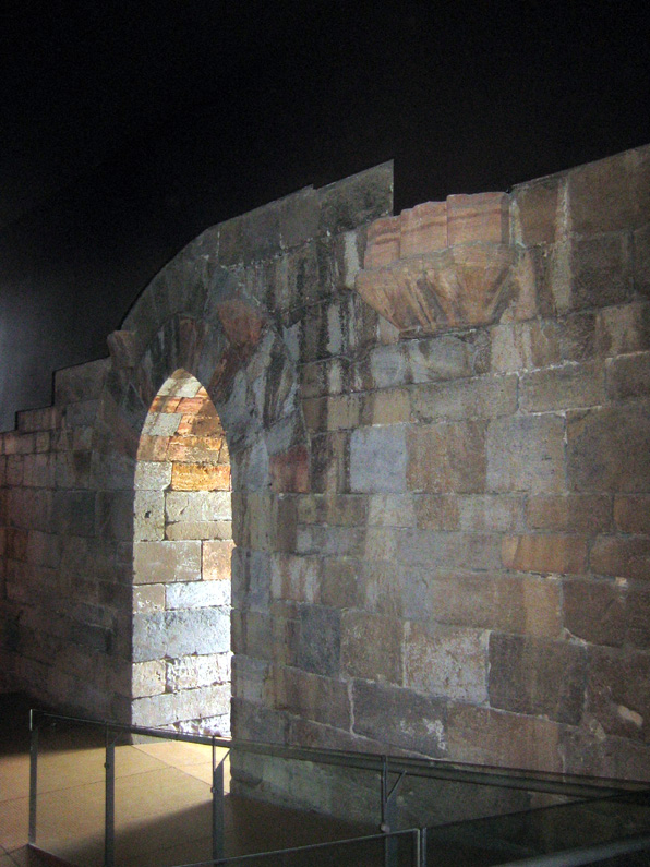 Interior del Castillo de la concepción de Cartagena